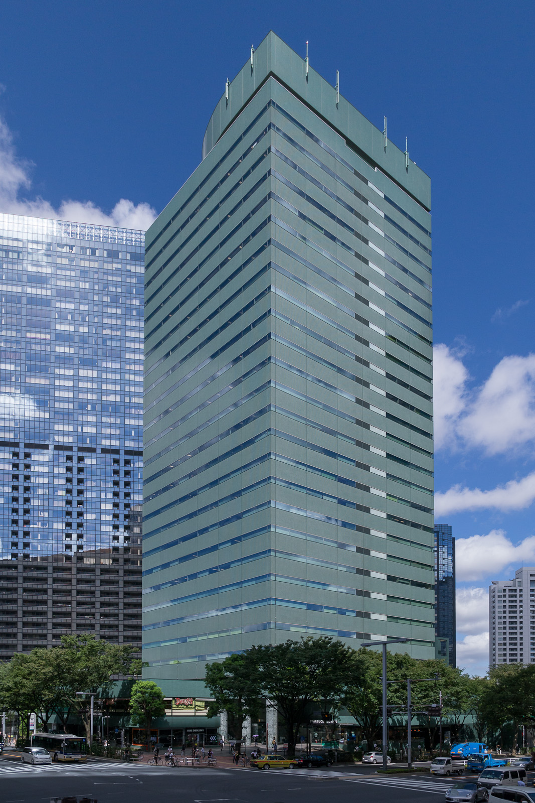 新宿グリーンタワービル、東京都新宿区西新宿。